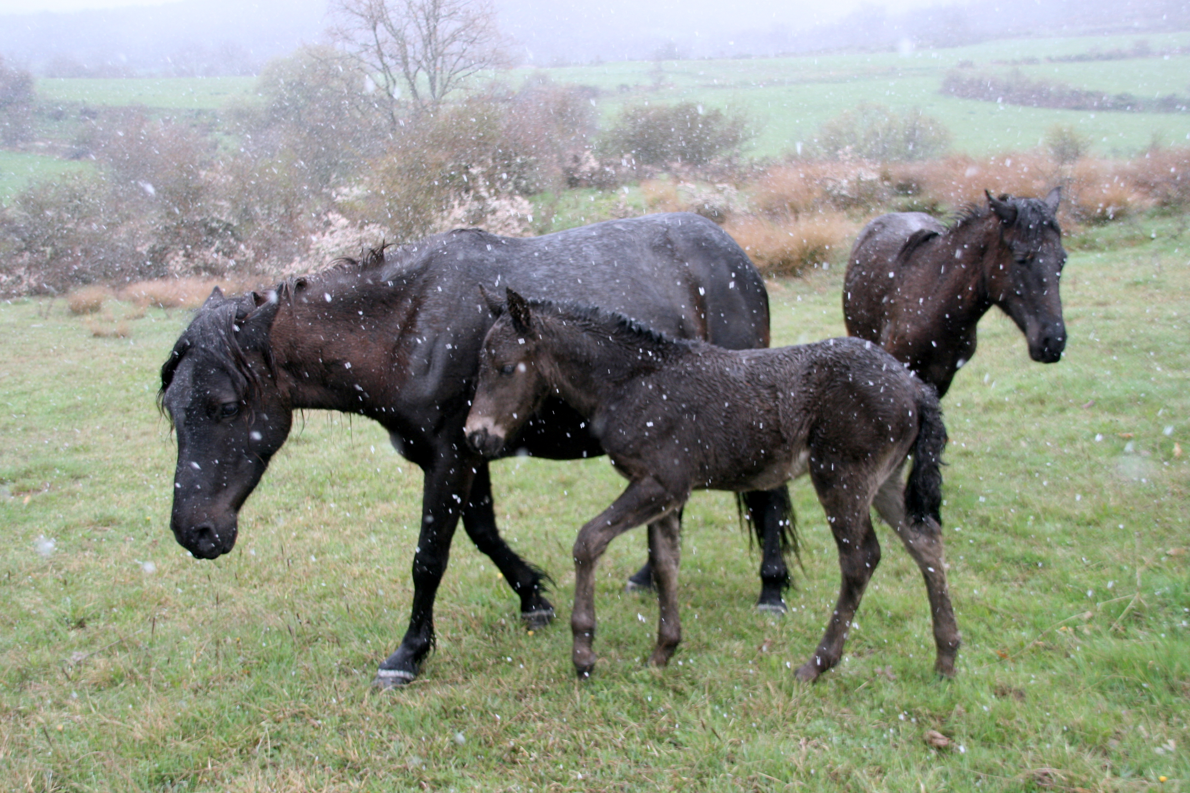 Caballos losinos en Bison Bosanus, Reserva y Centro de Interpretación del Bisonte Europeo de San Cebrián de Mudá (Palencia) This is a photography of a Special Area of Conservation in Spain with the ID: ES4140011. Natura2000 entry, EEA entry